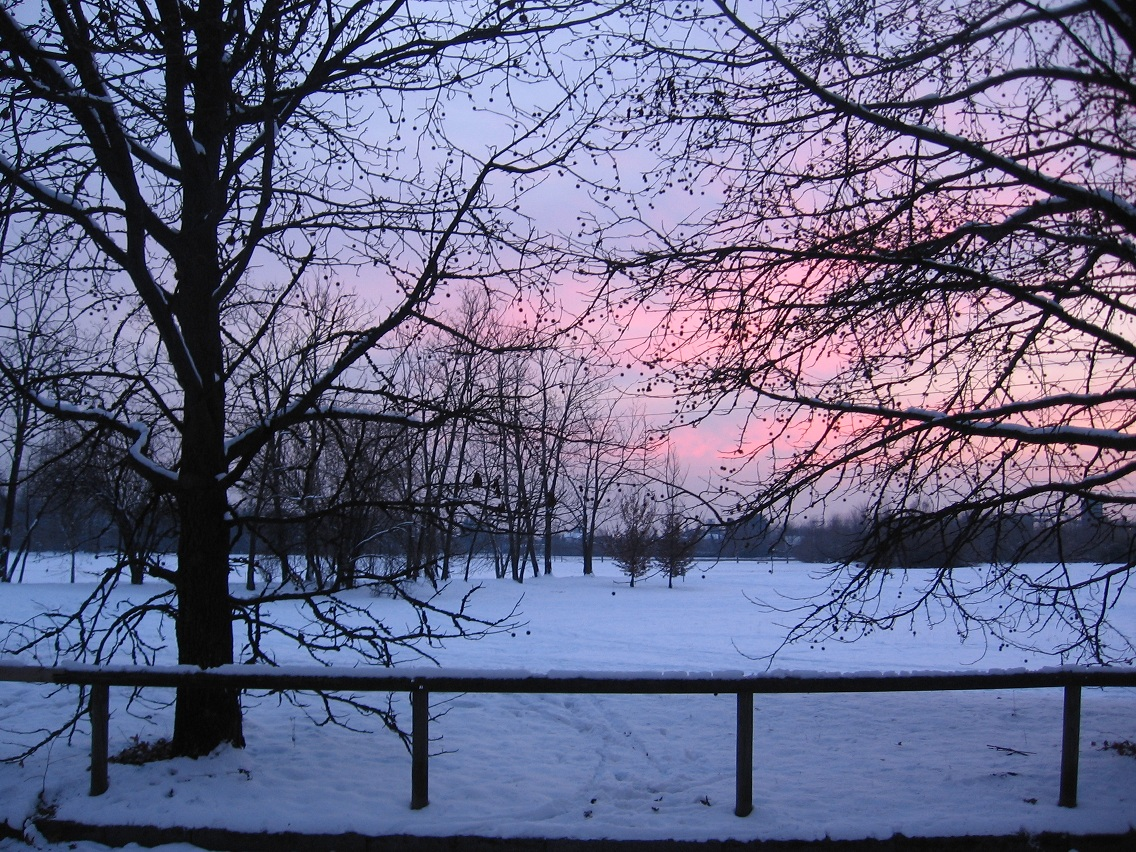 Parco Porada in veste invernale - febbraio 2012